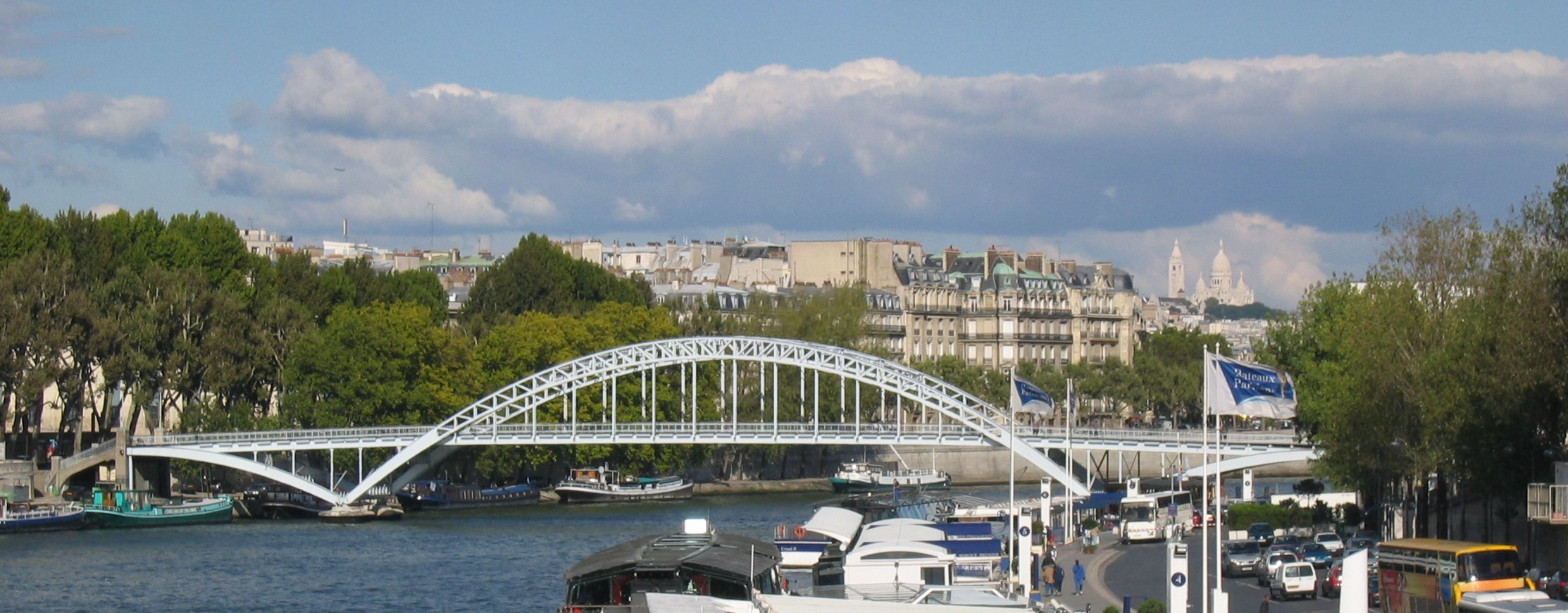 Photo de jour de la Passerelle Debilly Prise par Utilisateur:Jgremillot